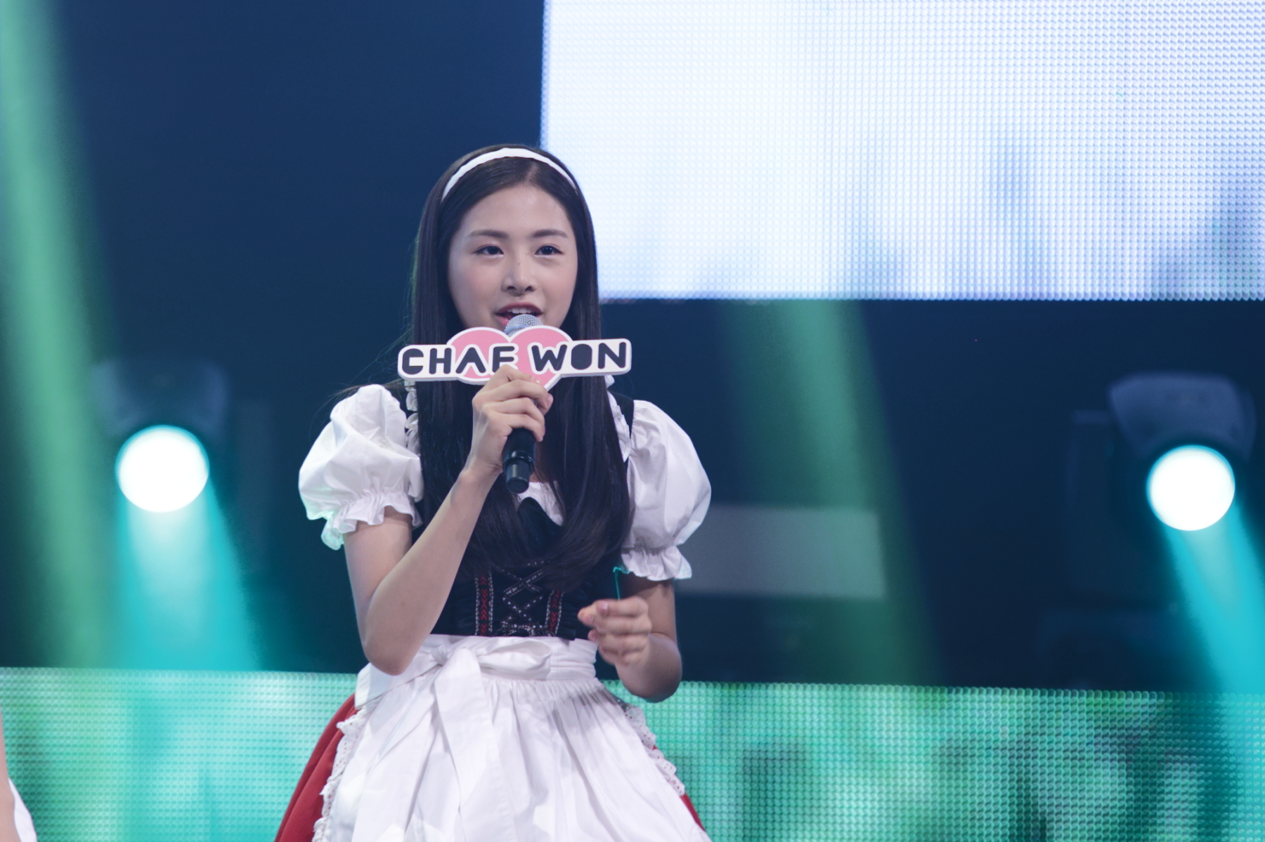 150825. 에이프릴 쇼케이스.